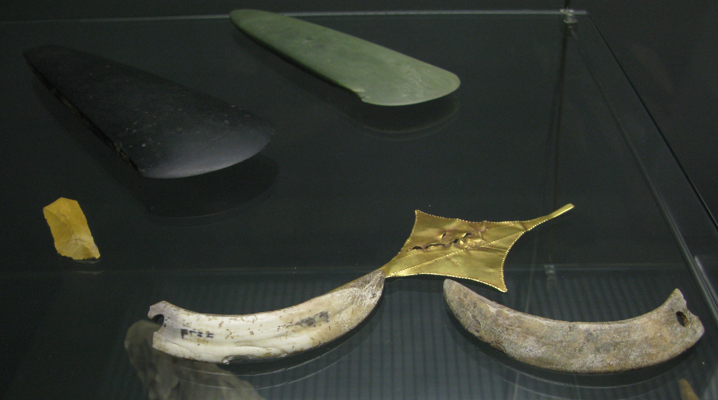 Pièces du trésor de Pauilhac, découvert en 1865 par des ouvriers : Plaque en or Canines de sanglier bi-perforées haches polies en jadéite et chloromélanite